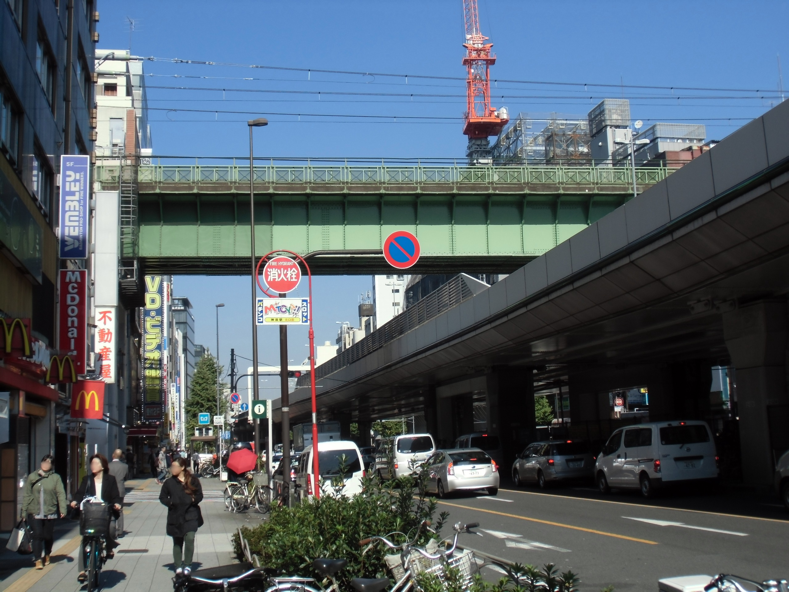 地上から見た昭和橋架道橋